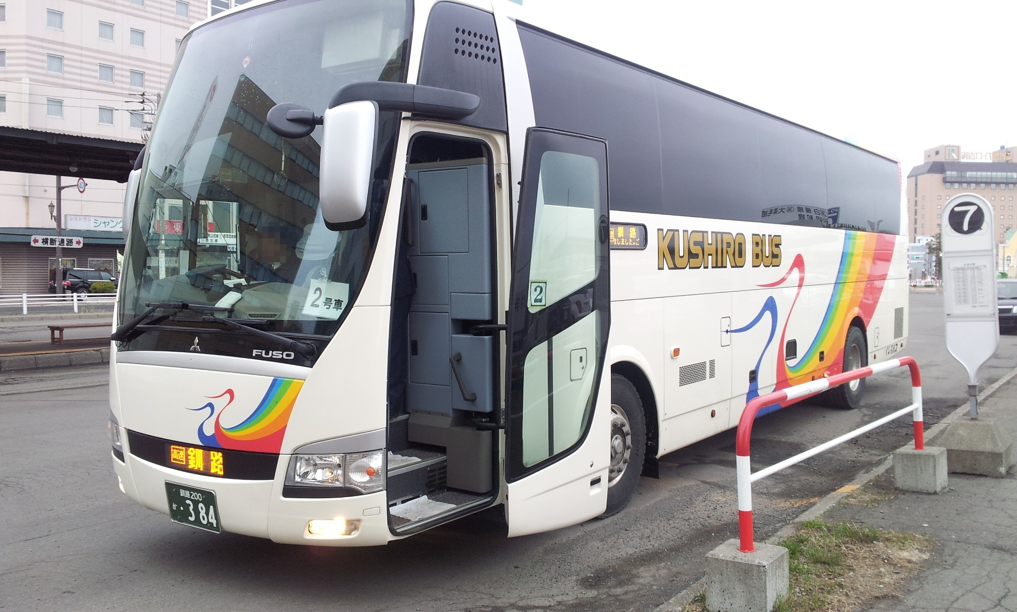 くしろバス「スターライト釧路号」専用車両２０１０年式「三菱ふそう・エアロクイーン」LKG-MS96VP ハイウェイランナー